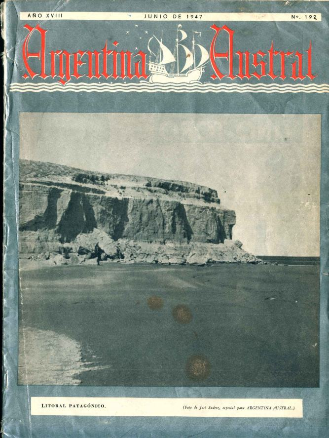 Tapa de la revista Argentina Austral